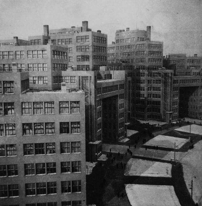 Gosprom. 1926-1928. Photo taken by Robert Byron in Kharkov, late 1920s. Госпром. Вид со стороны строящегося Дома проектов (ныне новое здание Харьковского университета). Source [1]